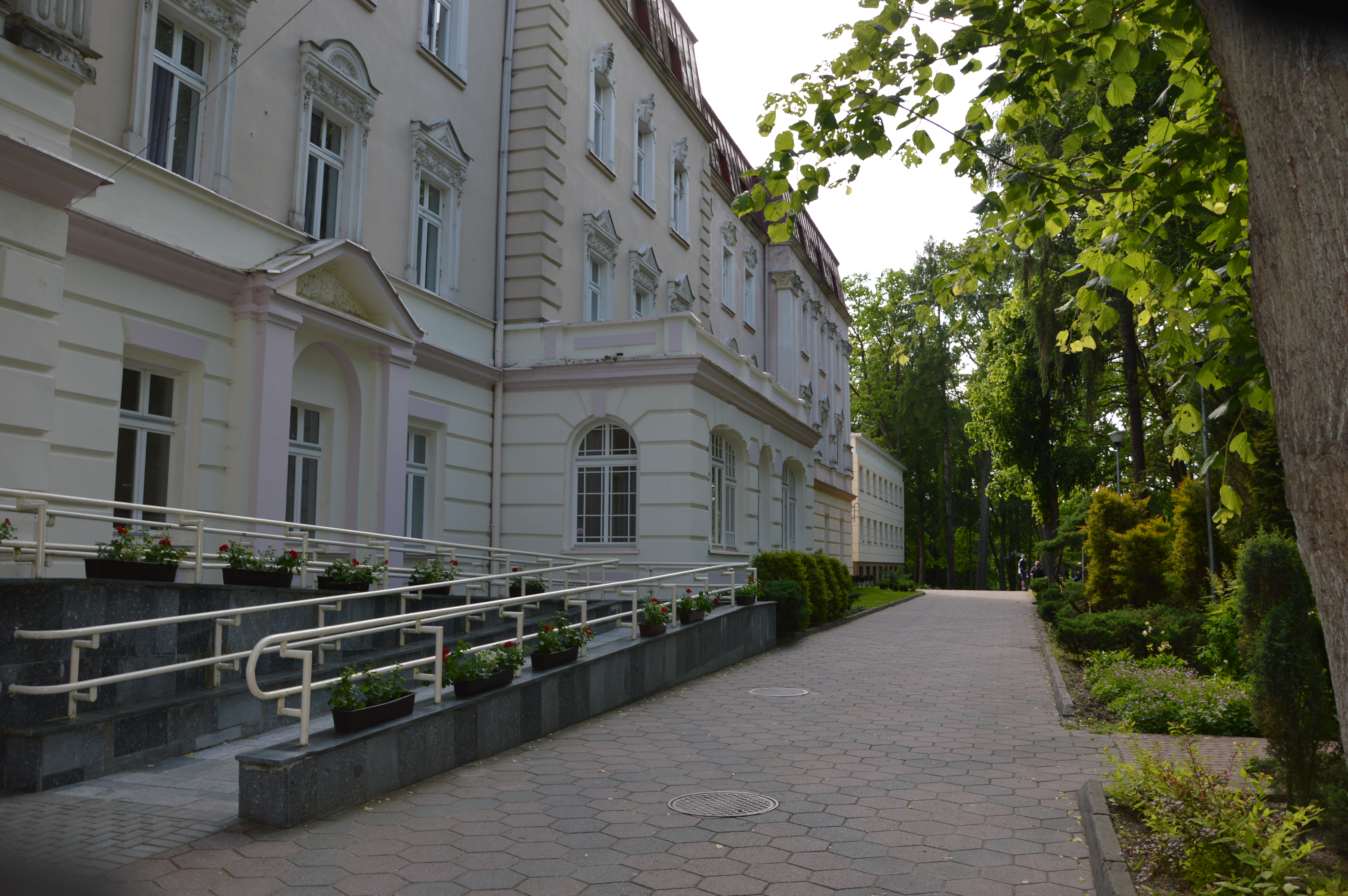 Połczyn Zdrój